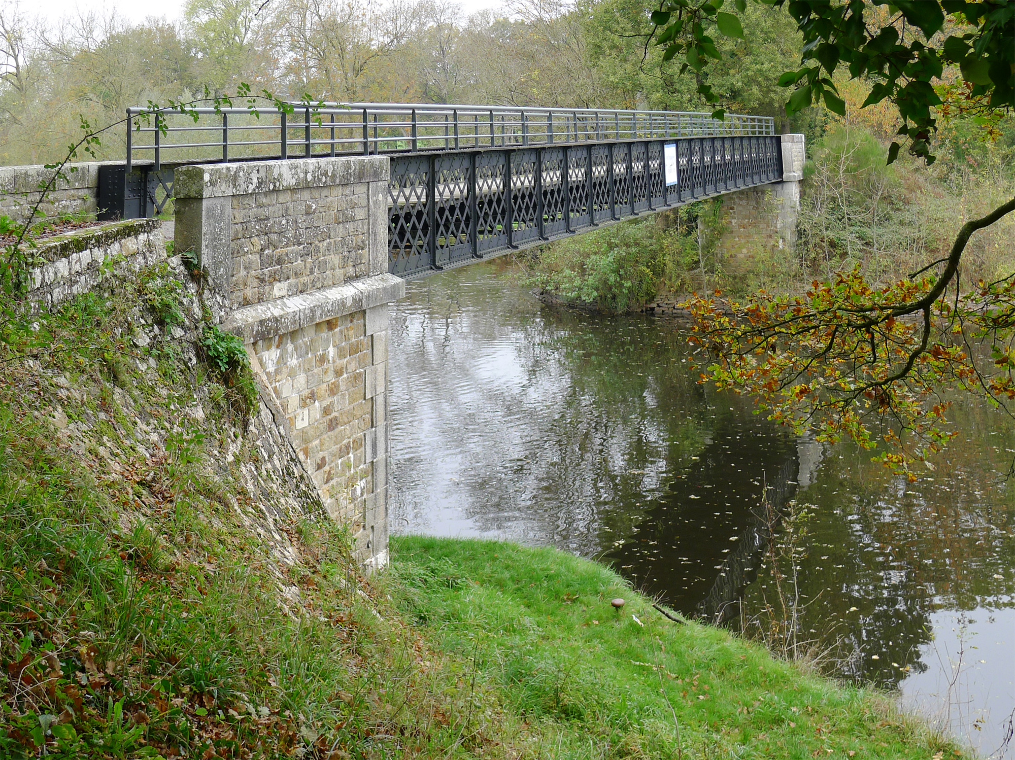 Pont métallique sur l'Oudon à proximité de sa confluence avec la Mayenne - Maine-et-Loire (France)